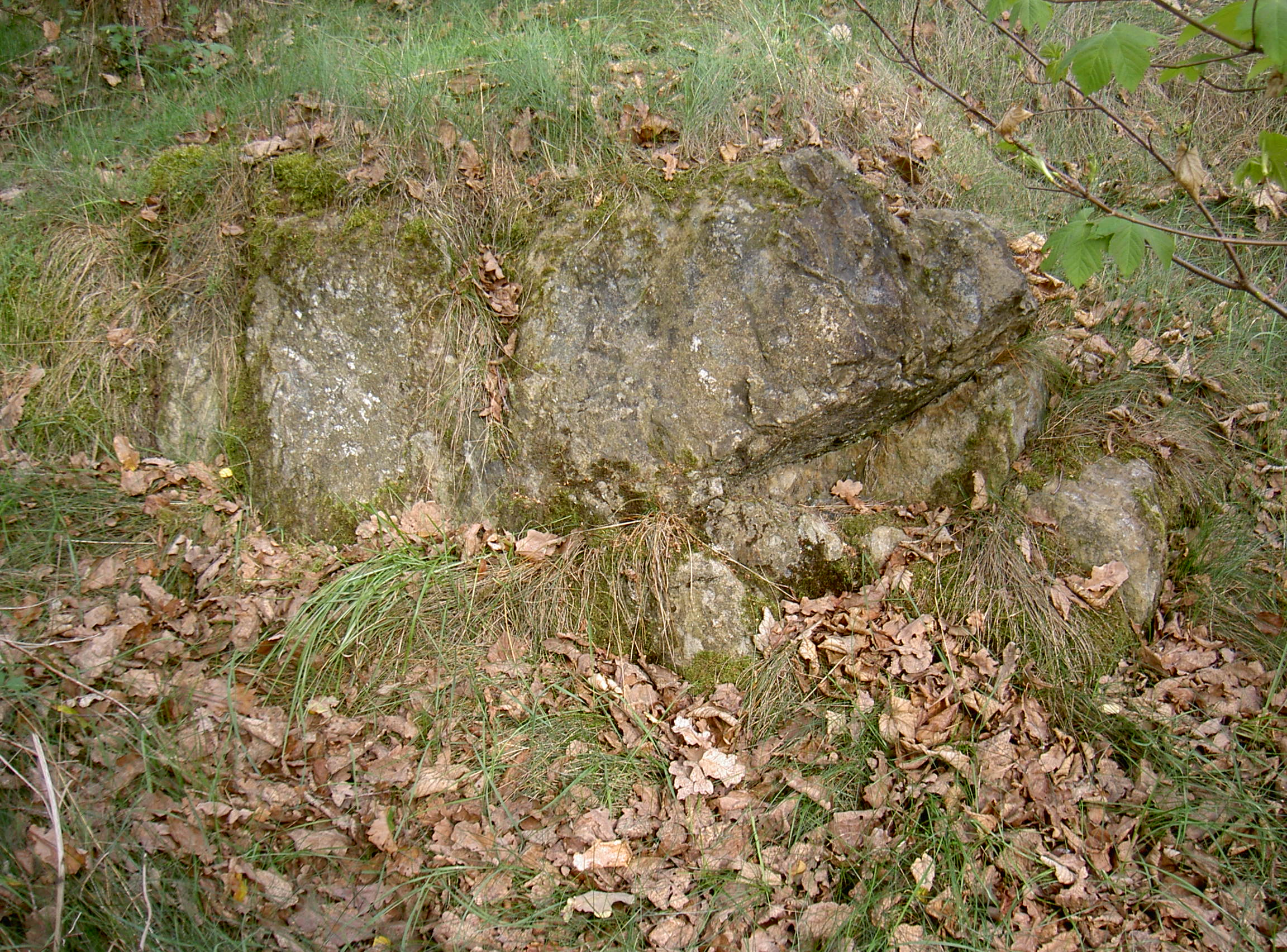 Nikolausberg Floß (Upper Palatinate)